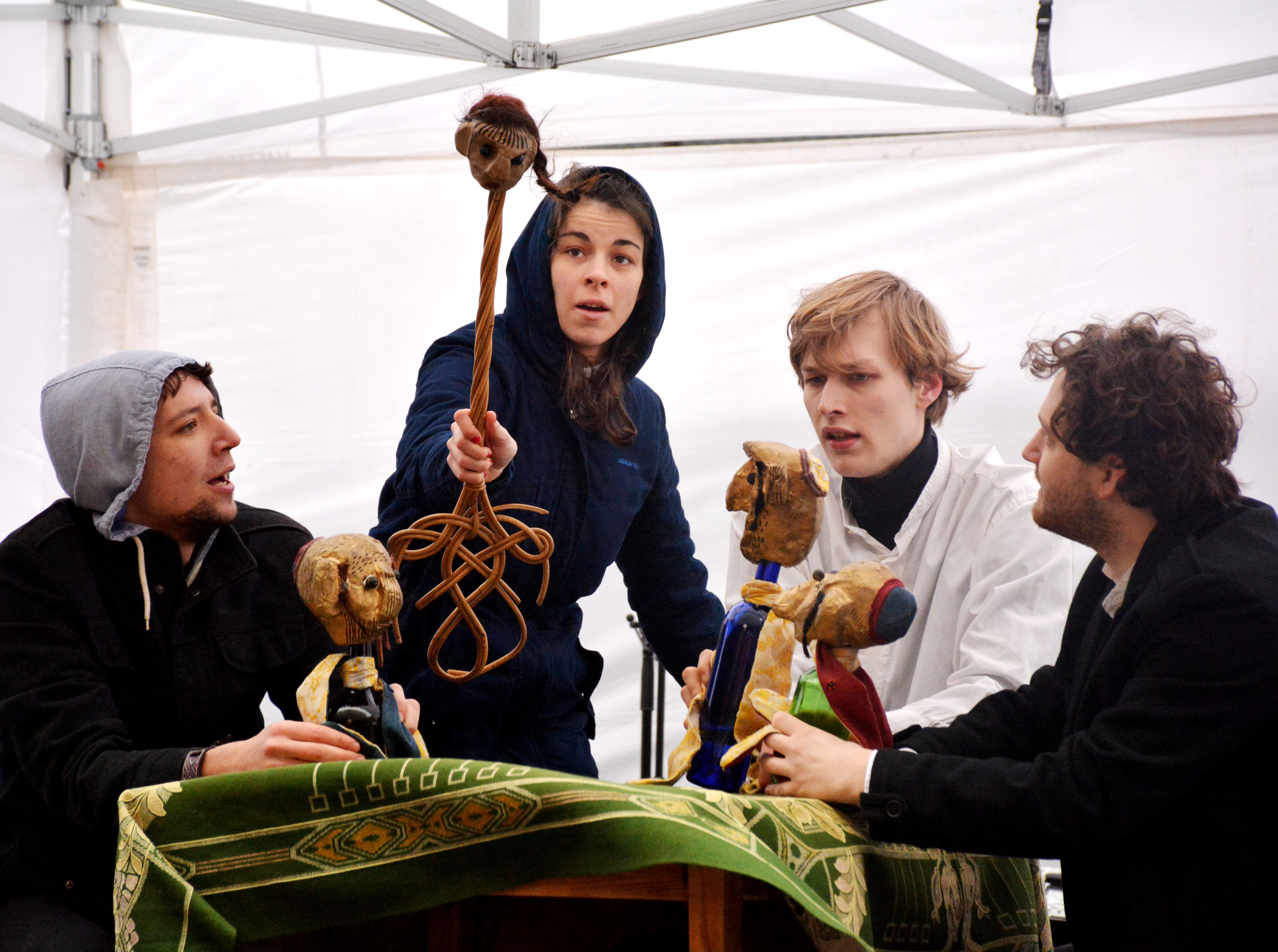 Studio DAMÚZA - záběr z pohádky "Hlupáci z Chelmu", provedené během akce "Dyzajn market" na piazzettě u Národního divadla